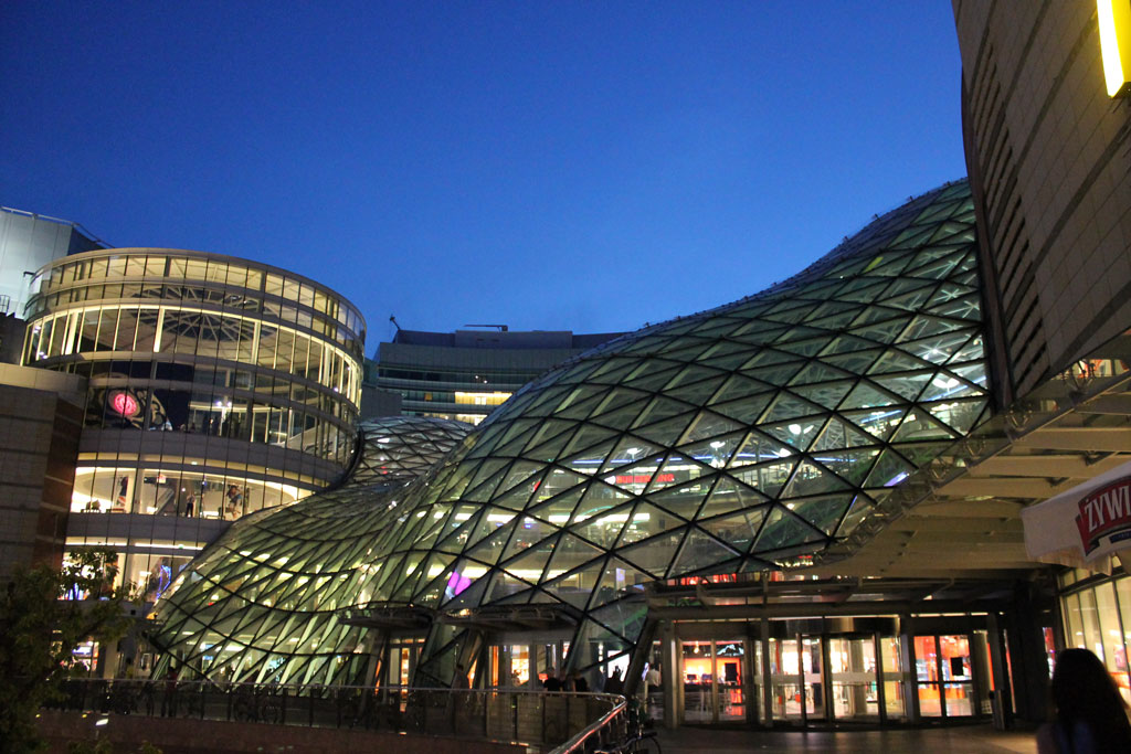 Centro Comercial Terrazas de Oro en Varsovia, se encuentra entre la estación central y el Palacio de Cultura y Ciencia.